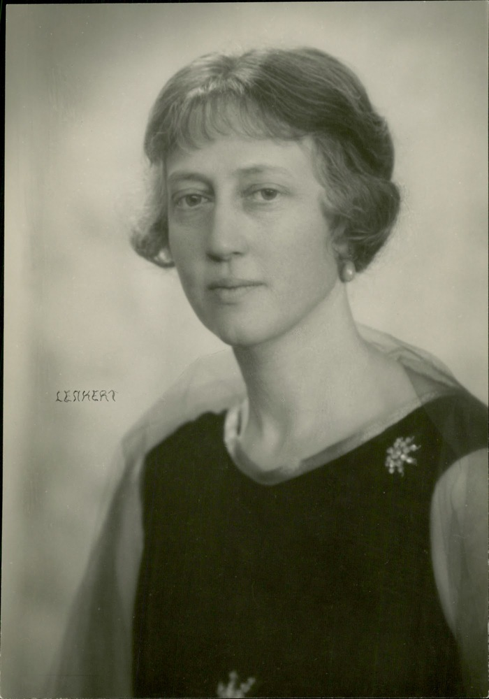 Baksidestext: "Fröken Louise Adelborg Konstnärinna vid Rörstrands porslinsfabrik." Av anteckning att döma publicerad i Husmodern 1930:9 sid 22.